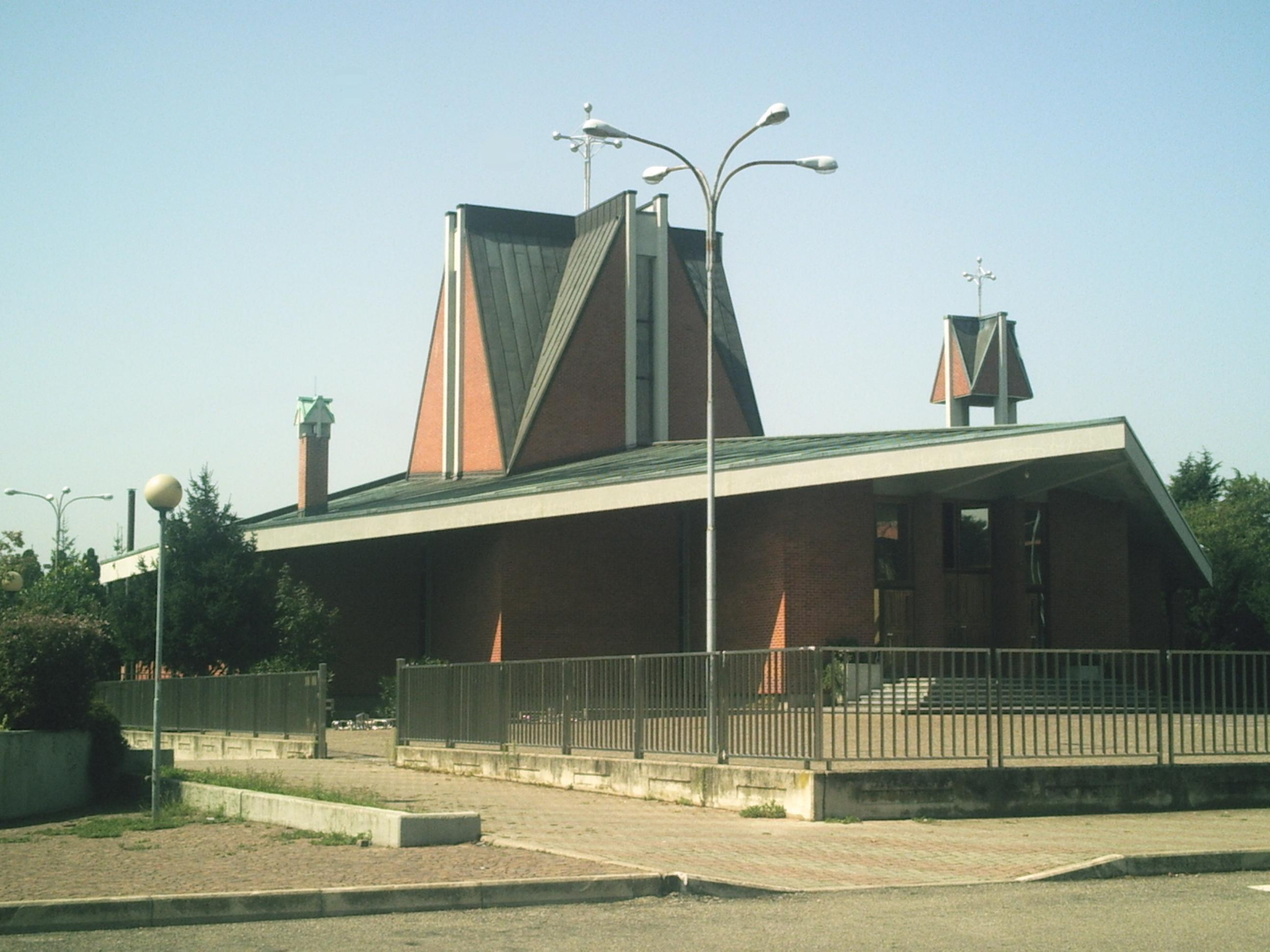 Chiesa Parrocchiale di Ravello (fraz. di Parabiago) dedicata a "Gesù Crocefisso".